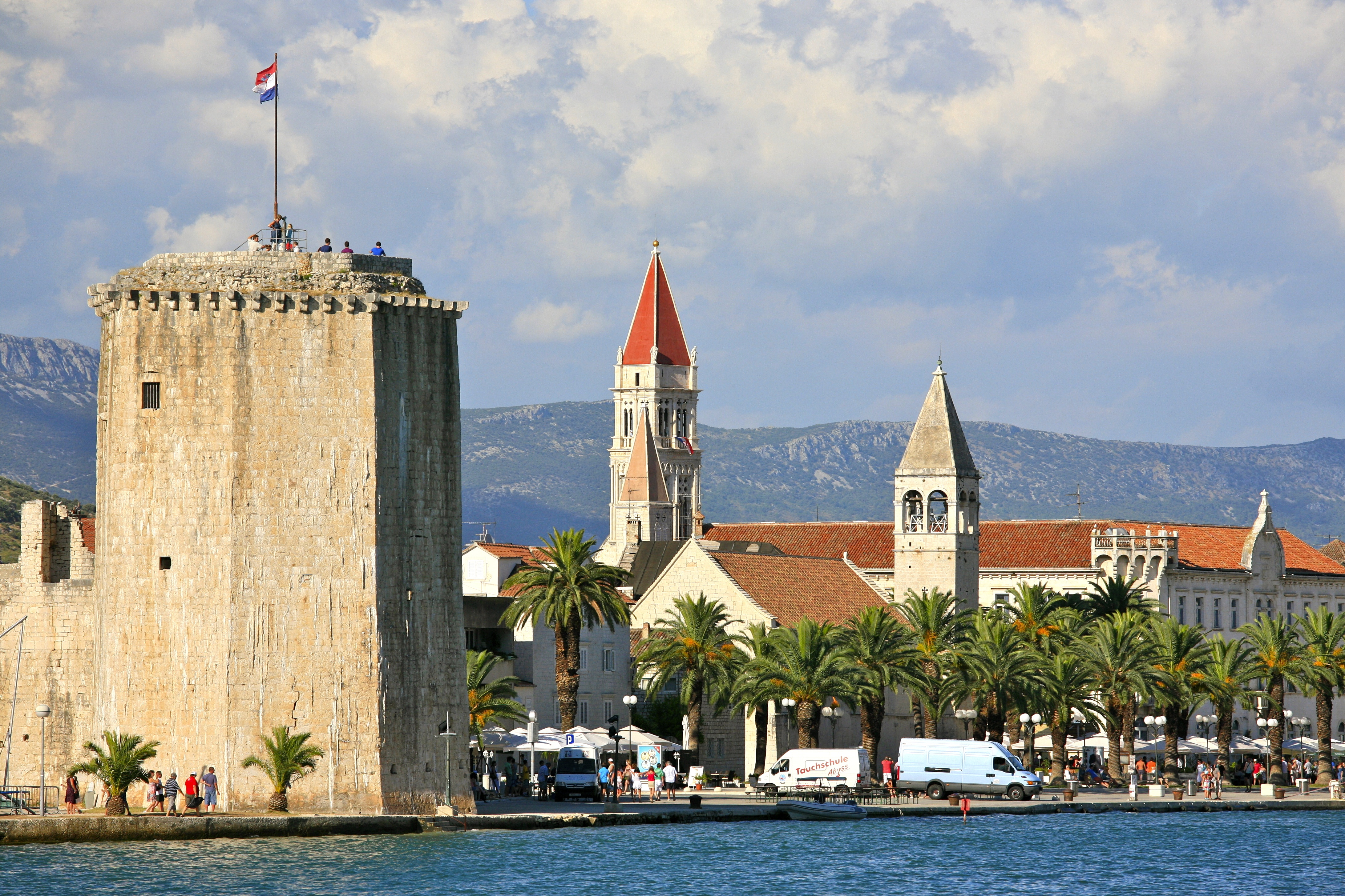 Trogir (Latin: Tragurium ; Greek: Τραγύριον or Τραγούριον,[1] Trogkir